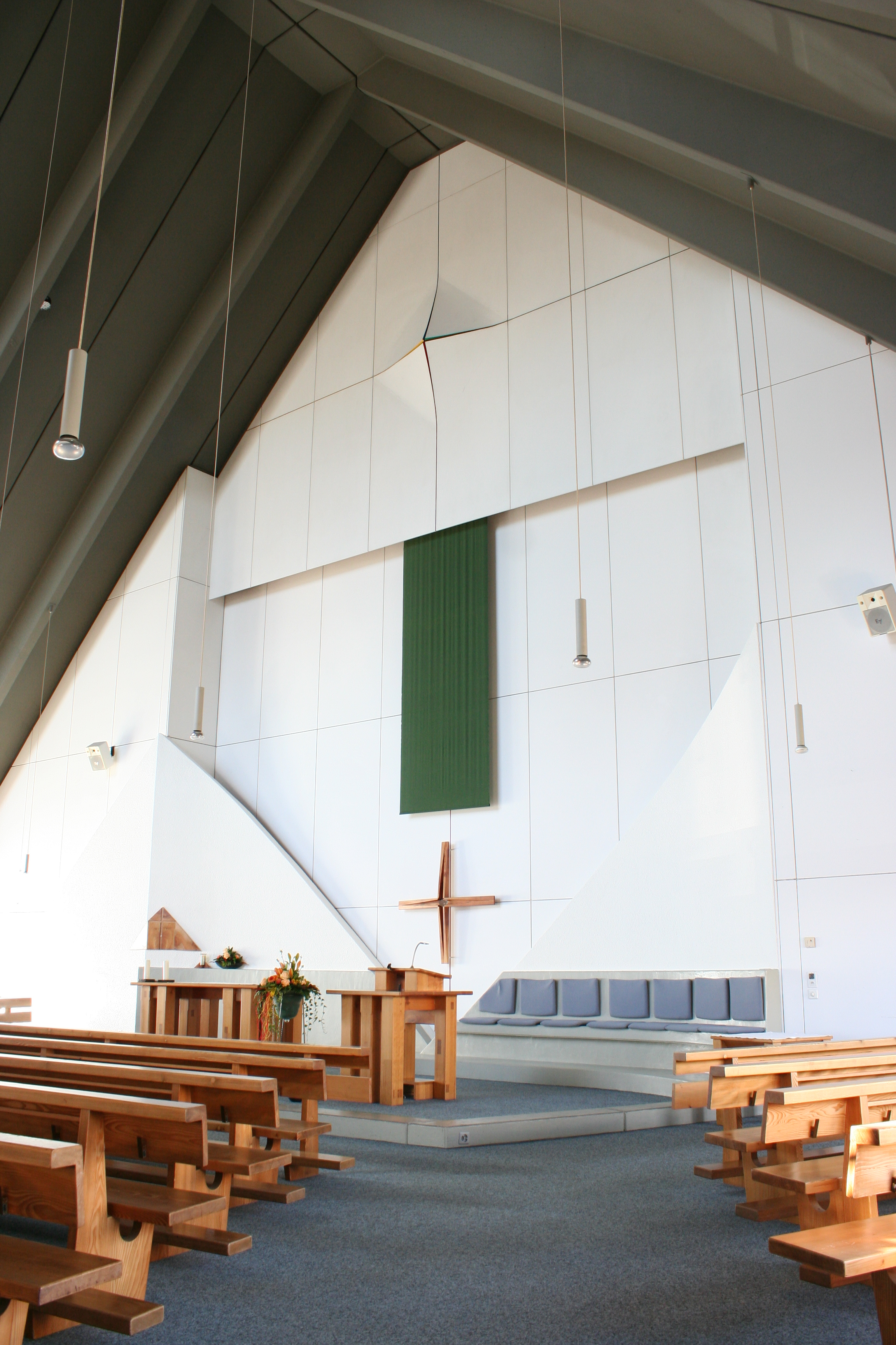 Römisch-katholische Kirche Bruder Klaus Volketswil, Gestaltung von Primo Lorenzetti